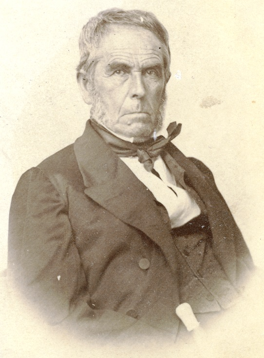 Joaquín Gandarillas Aránguiz; (Santiago, 1786 - 1843). Hijo de don Nicolás José Gandarillas y Romero y doña María Rita Aránguiz Mendieta. Contrajo nupcias con Ana María Valdés Aldunate y tuvo once hijos. Heredero de la hacienda de Macul. Educado en Derecho en la Real Universidad de San Felipe.